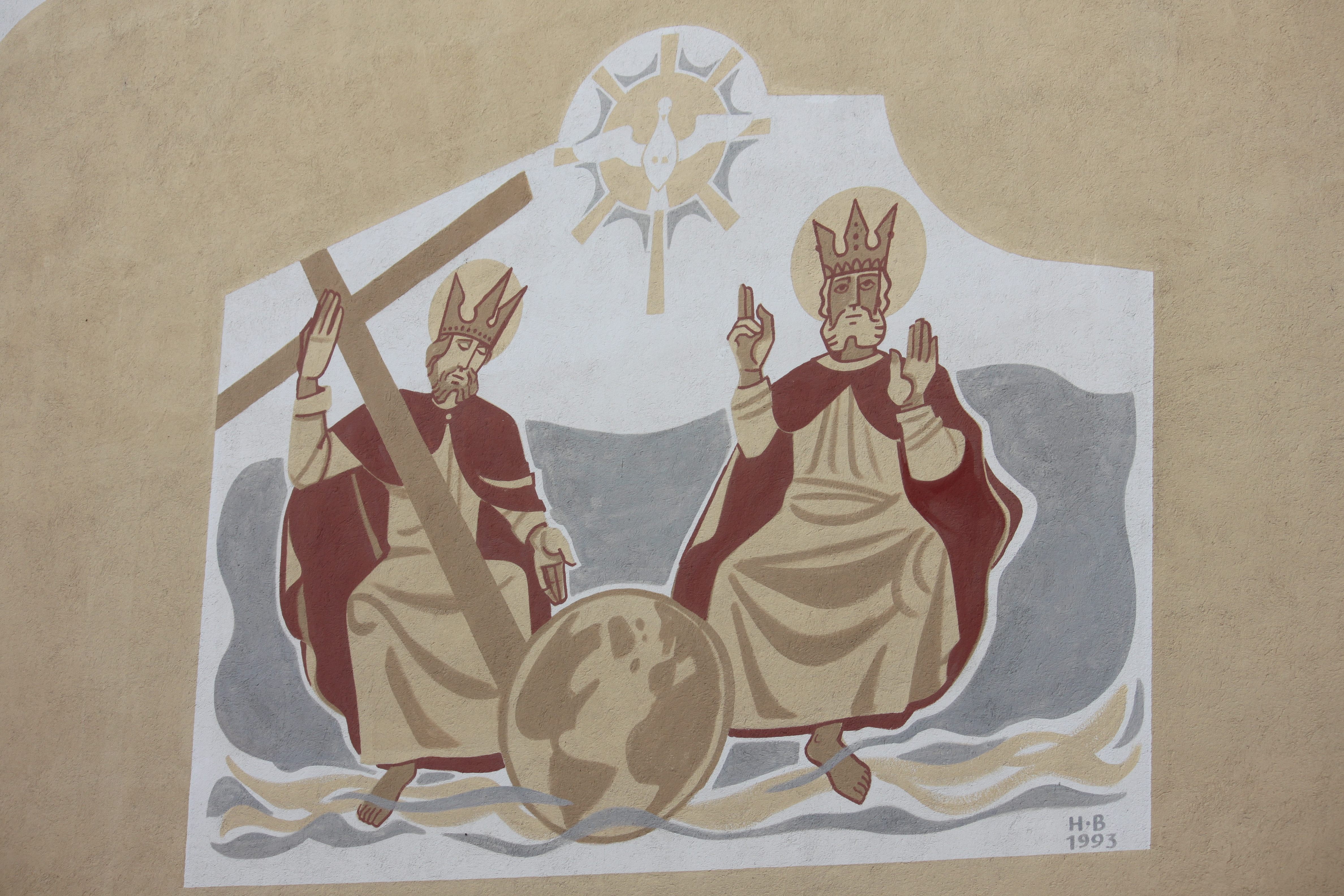 Kath. Pfarrkirche hl. Antonius von Padua, Wandmalerei nach Süden, figurale Darstellung der Dreifaltigkeit, vom Maler Hermann Bauch (1993)